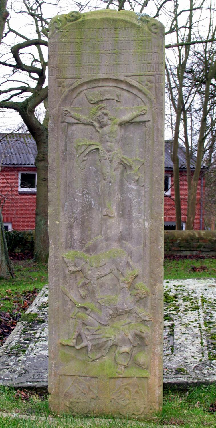 Grabstele Peter Swyn, Geschlechterfriedhof in Lunden